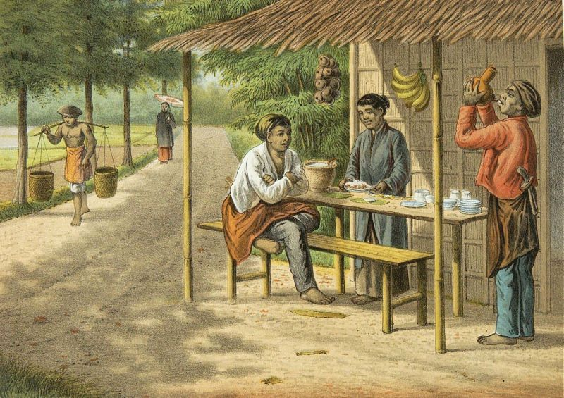 Litho. Kleurenlitho naar een oorspronkelijke aquarel van Rappard.. Huis langs de weg waar eten verkocht wordt